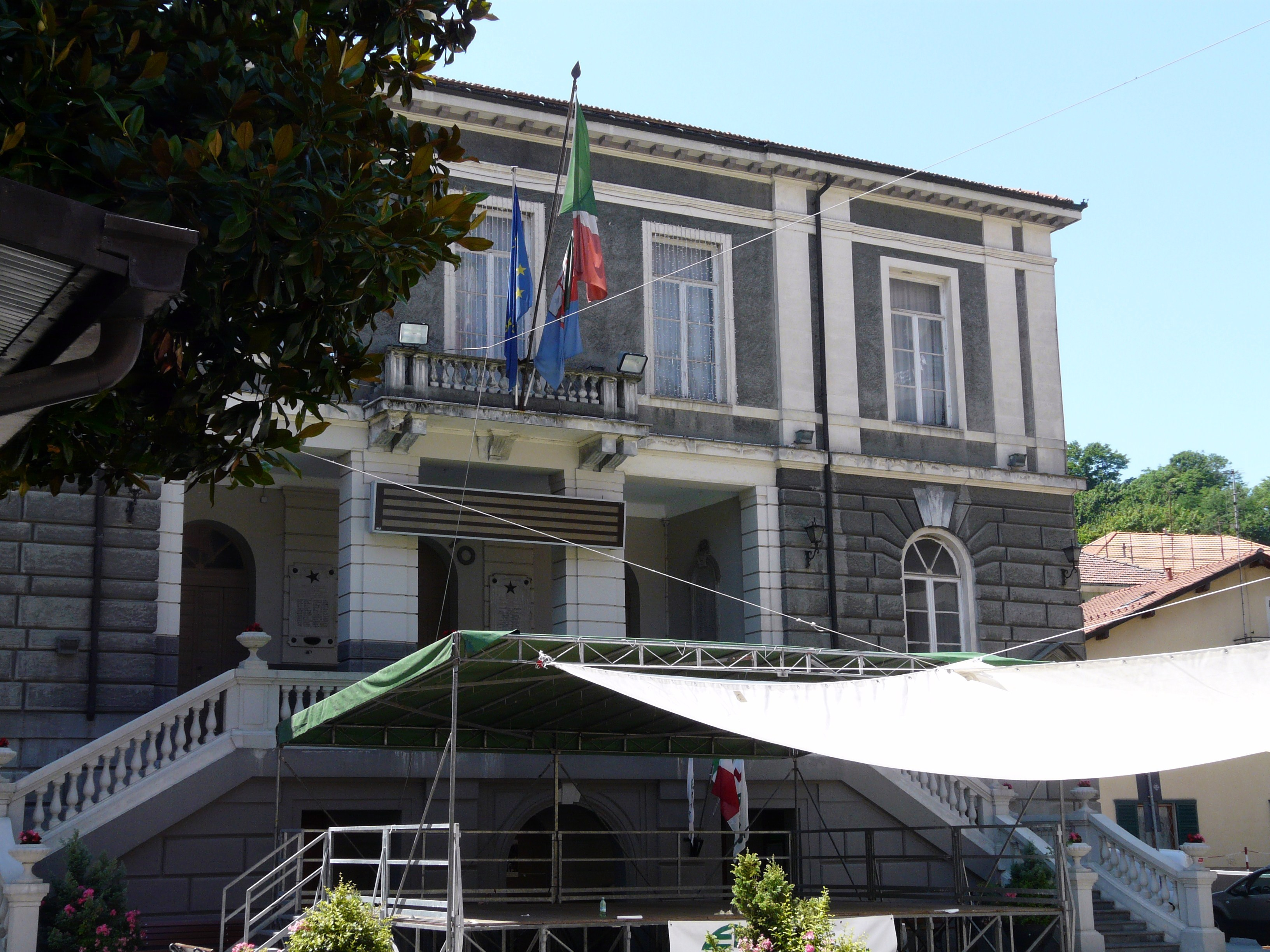 Il municipio di Busalla, Liguria, Italia